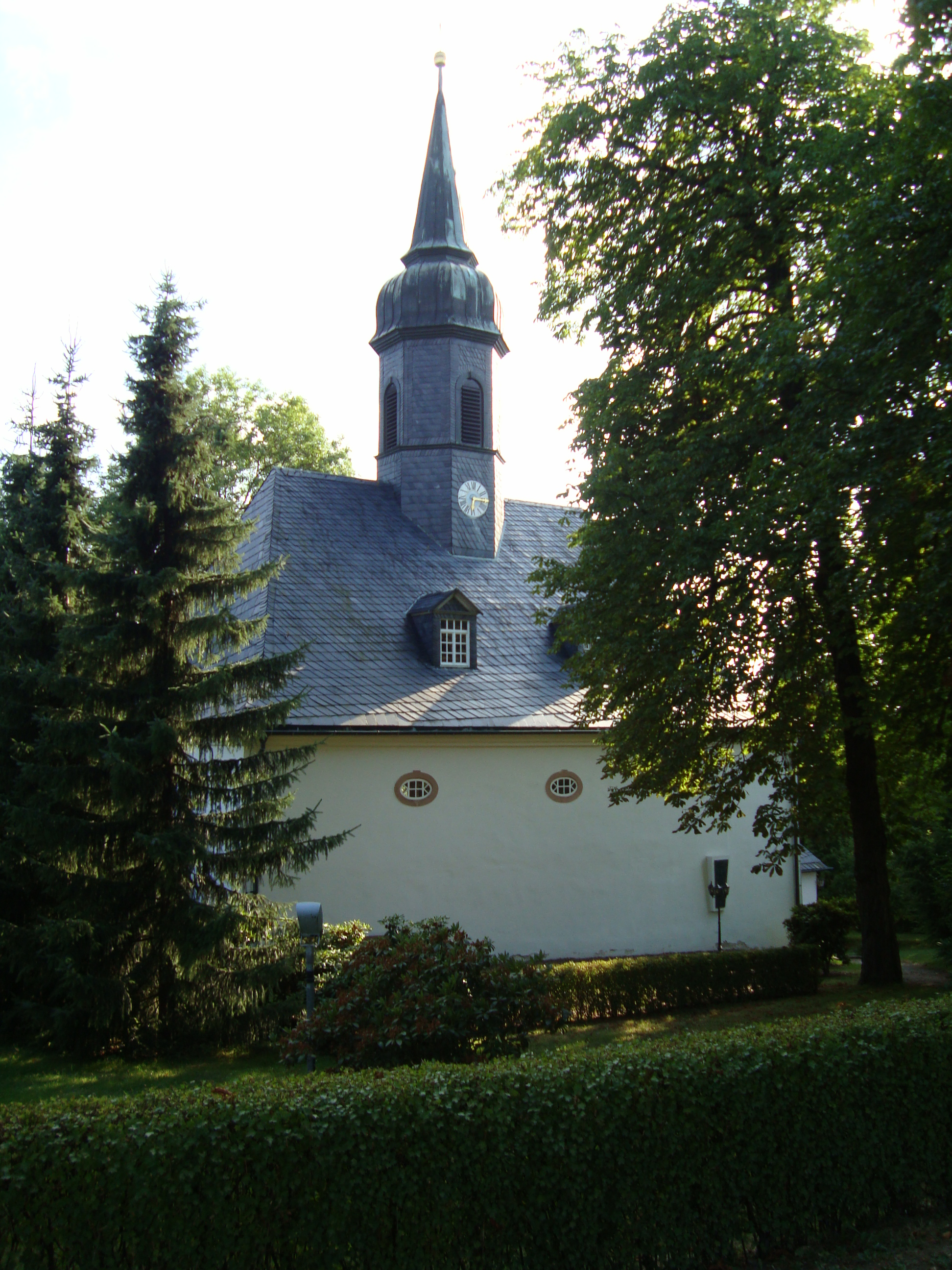 Kirche in Ursprung im Erzgebirge